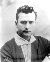 Fotografía del cineasta Thomas Harpes Ince